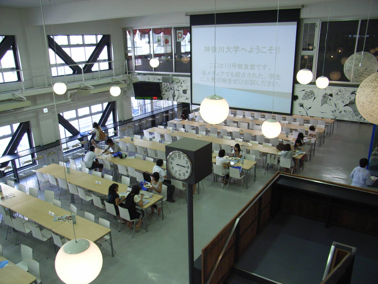 オープンキャンパス時の学食